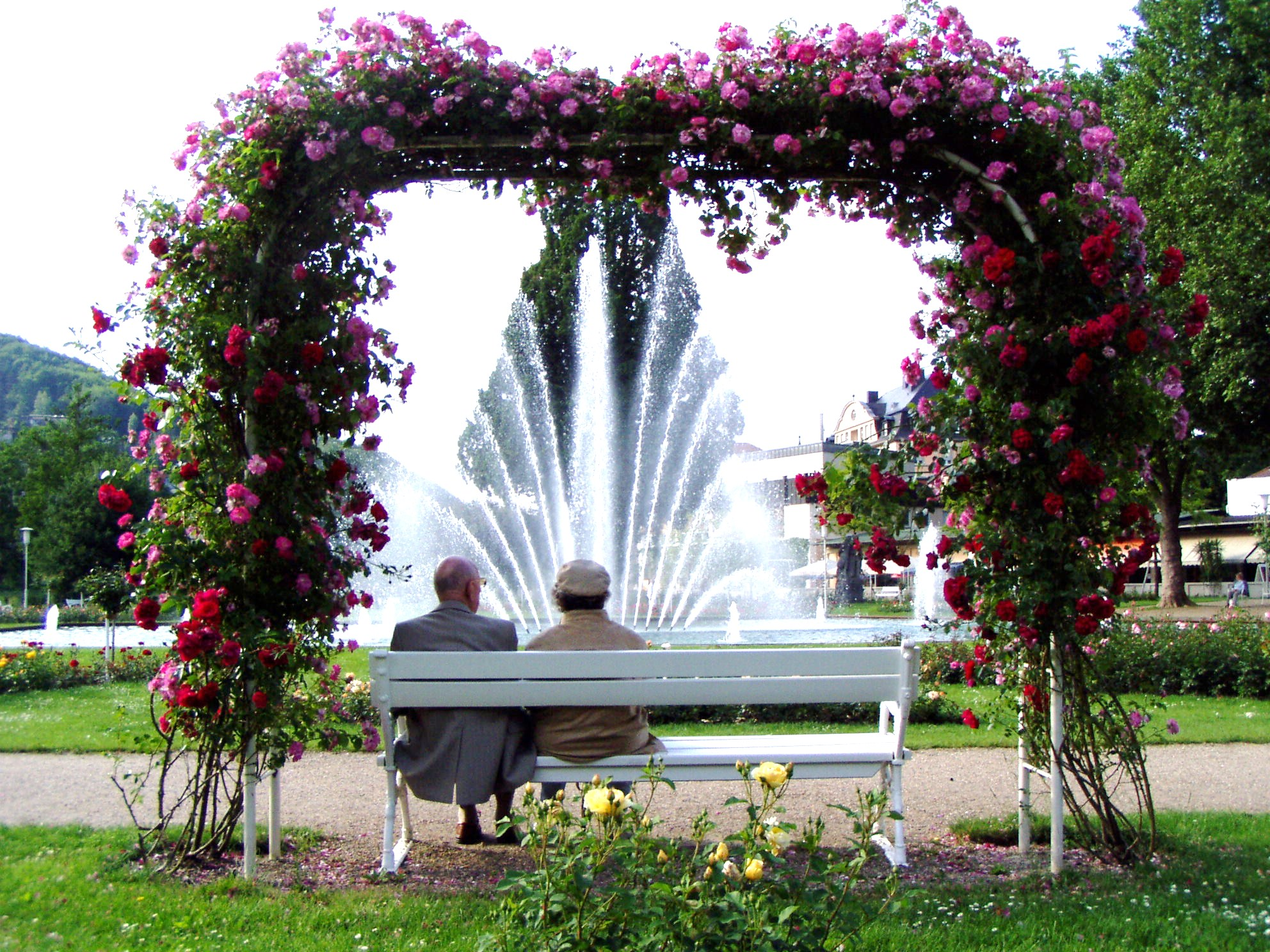 Rose Garden in Bad Kissingen